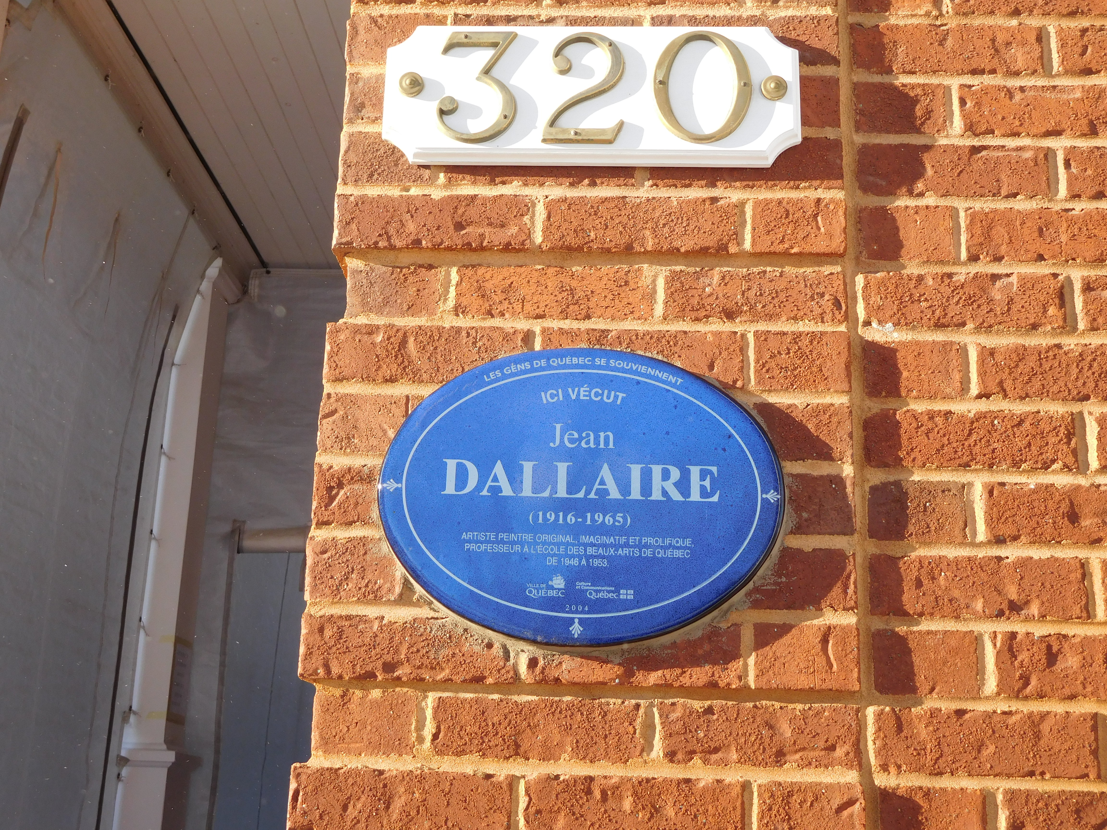 Plaque apposée à la maison située au 320 rue De Bernières, Québec Texte de la plaque « Ici vécut Jean Dallaire (1916-1965), artiste peintre original, imaginatif et prolifique, professeur à l’École des beaux-arts de Québec de 1946 à 1953. »